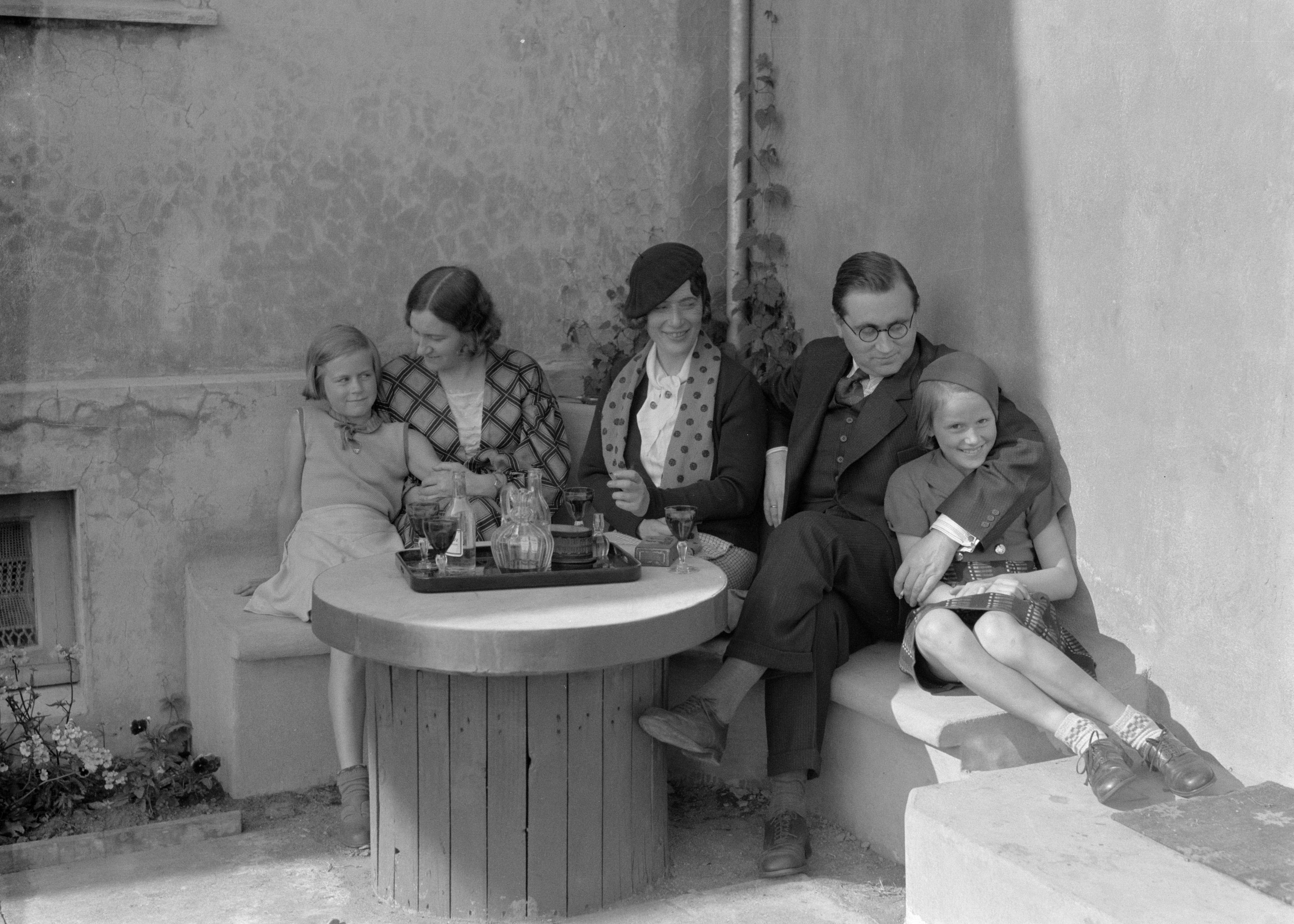 Collectie / Archief : Fotocollectie Van de Poll Reportage / Serie : IJsland Beschrijving : De journaliste Anita Jaochim tussen de schilderes Kristín Jónsdóttir en haar echtgenoot de uitgever en schrijver Valtýr Stefánsson met hun beide kinderen Datum : 1934 Locatie : IJsland Trefwoorden : families, journalisten, kinderen, schilders, schrijvers, tafels, uitgeverijen Persoonsnaam : Anita, Joachim, Anita, Jónsdóttir, Kristin, Stefánsson, Valtýr Fotograaf : Poll, Willem van de Auteursrechthebbende : Nationaal Archief Materiaalsoort : Glasnegatief Nummer archiefinventaris : bekijk toegang 2.24.14.02 Bestanddeelnummer : 190-0476 Reacties Geplaatst door Aslaug Kirstin op 28 december 2012 - 01:07. Kristín Jónsdóttir en Valtýr Stefánsson